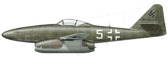 Me 262 A-1a W.Nr. 111745 “White 5” of JV.44, Munich-Reim, April 1945